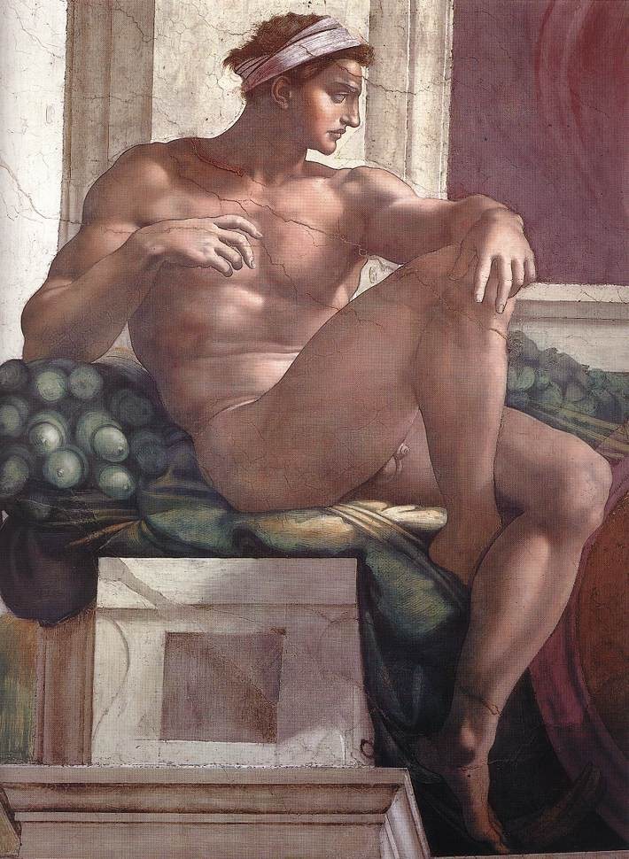 Sistine Chapel, fresco Michelangelo